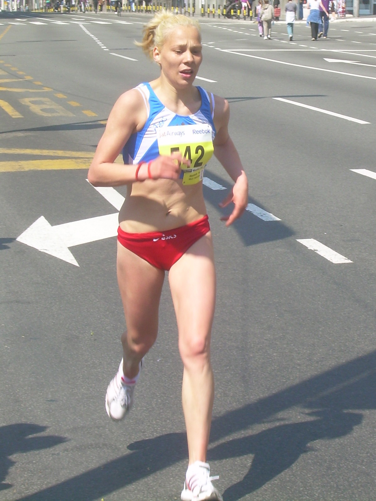 23. Београдски маратон, црногорска атлетичарка Слађана Перуновић другопласирана на полумаратонској трци. Слика направљена 18. априла 2010.